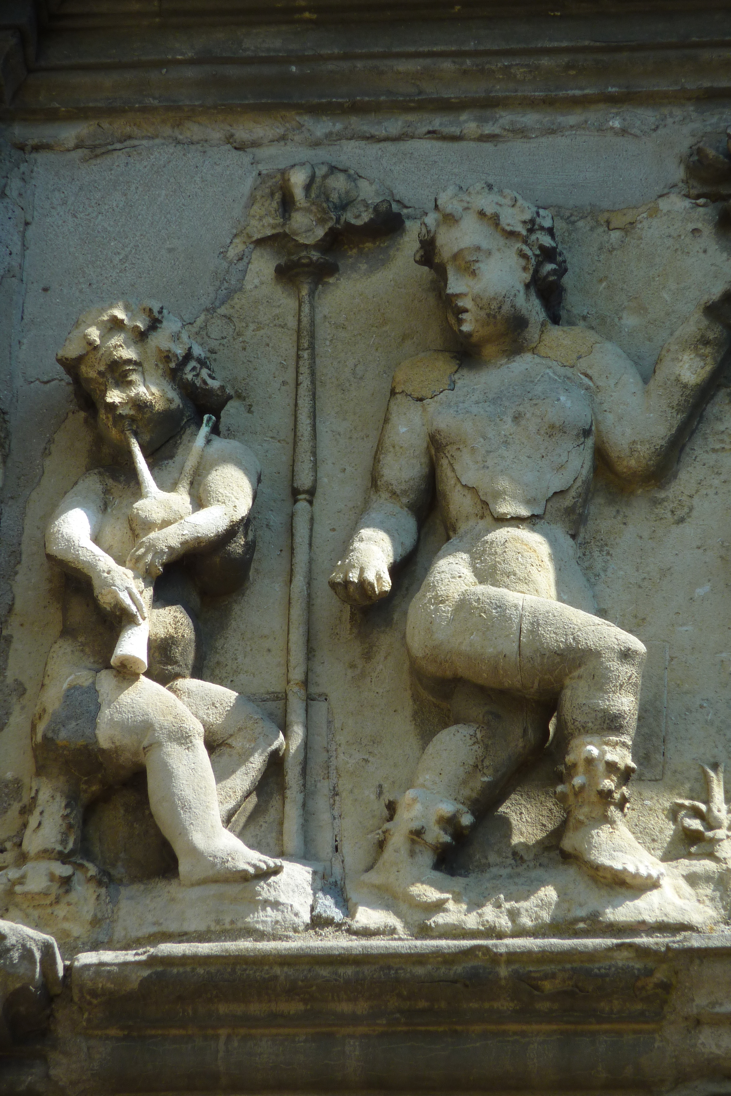 Hôtel Chabouillé in Moret-sur-Loing im Département Seine-et-Marne in der Region Île-de-France (Frankreich), Renaissancefassade, Relief mit Putten (Ausschnitt)